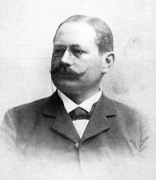 Berndt Wijkander (1859-1925) på omslaget av Hvar 8 Dag 1909